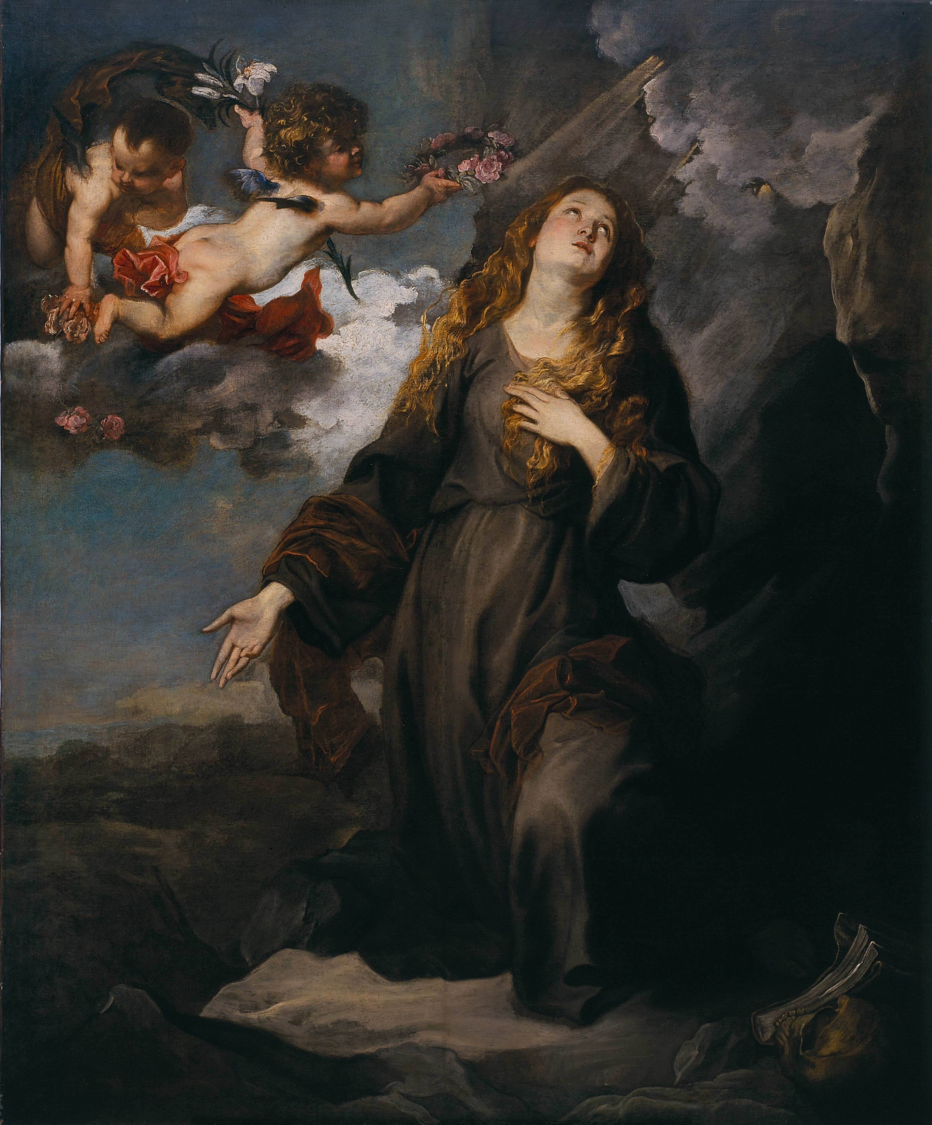 St. Rosalie in Glory